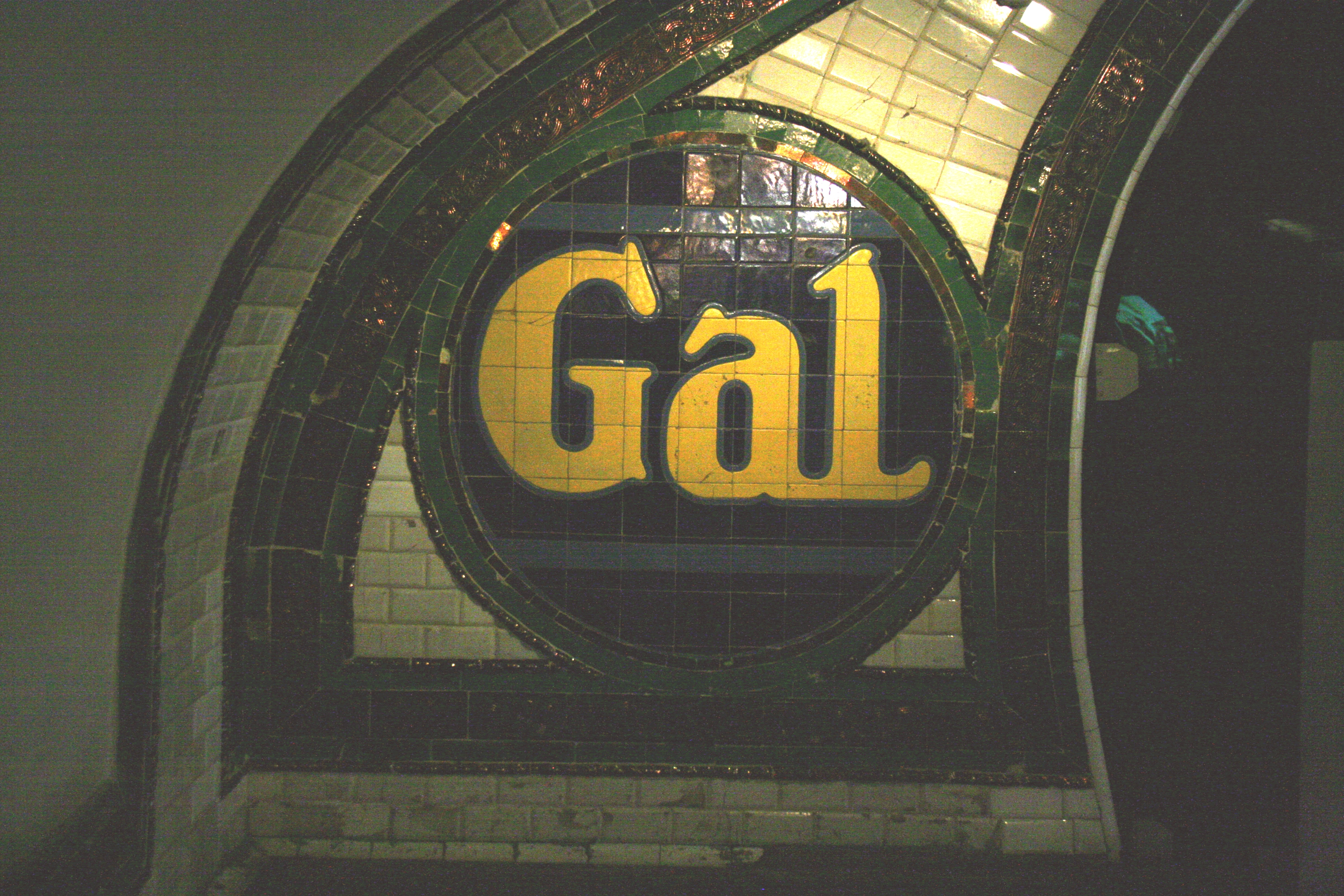 Gal - Anuncio de jabones